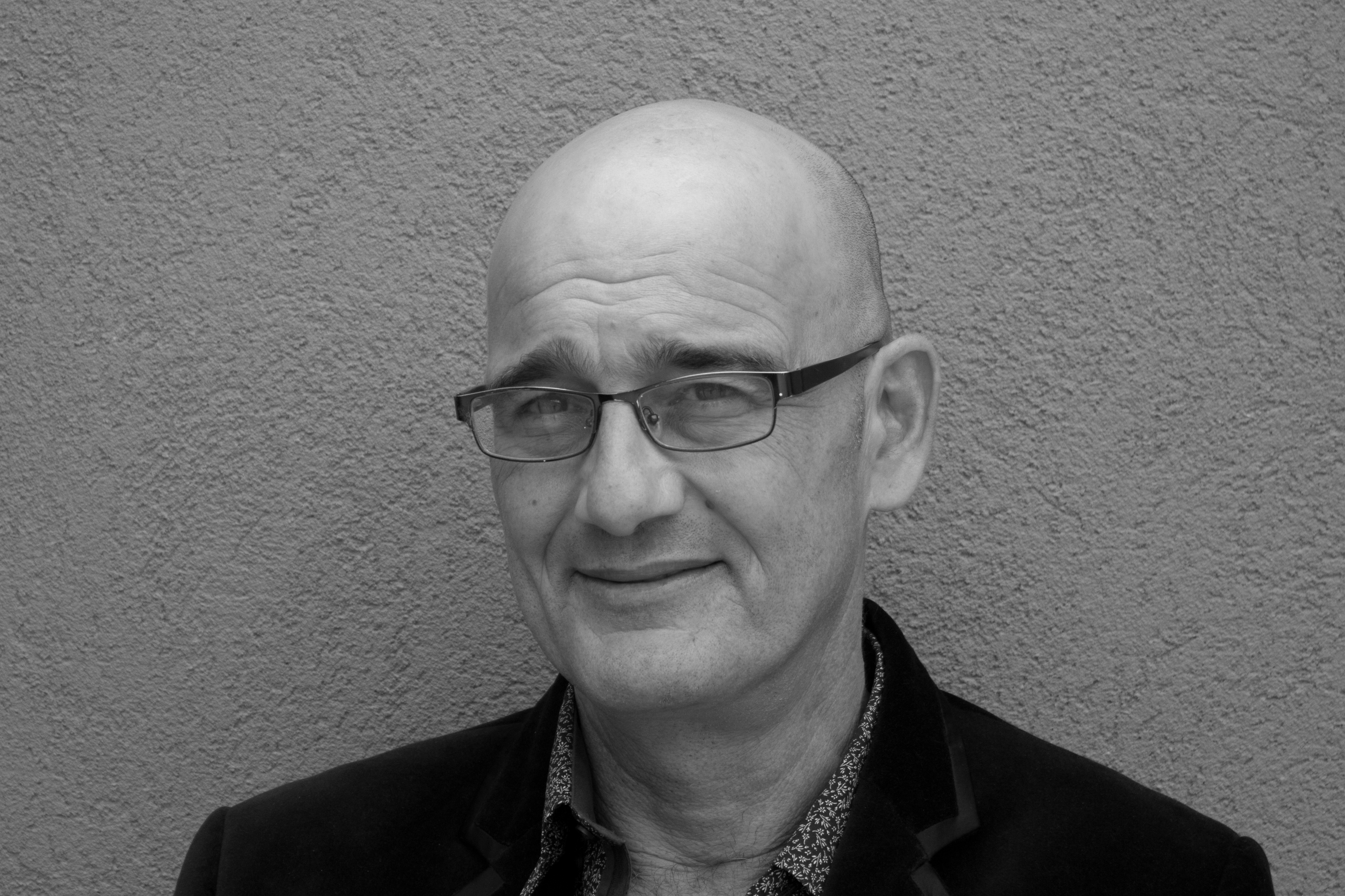 תמונתו של אילן חצור